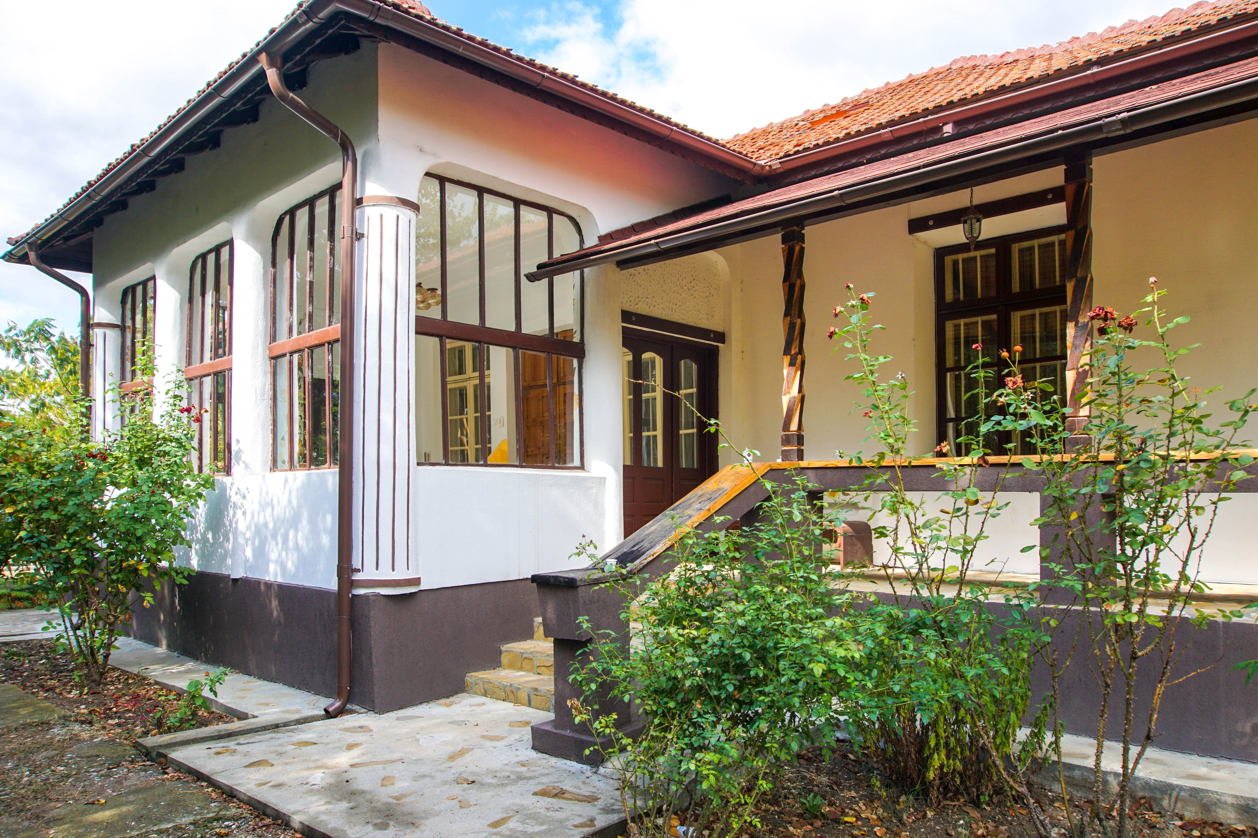 Conacul boierului Koșca